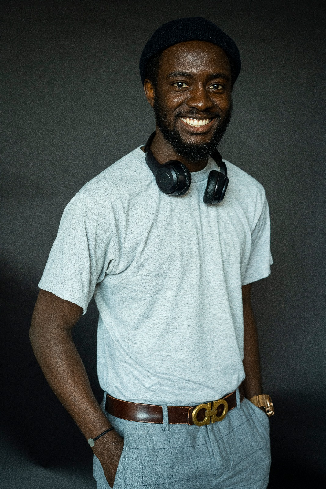 foto pentru social media